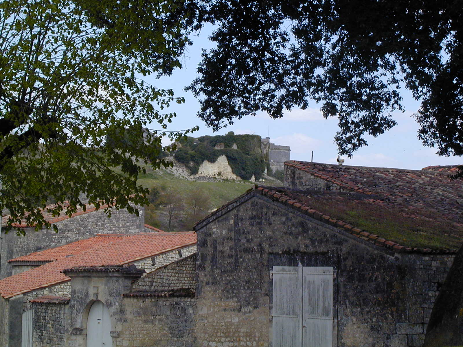 Château de Bouteville, Charente, France